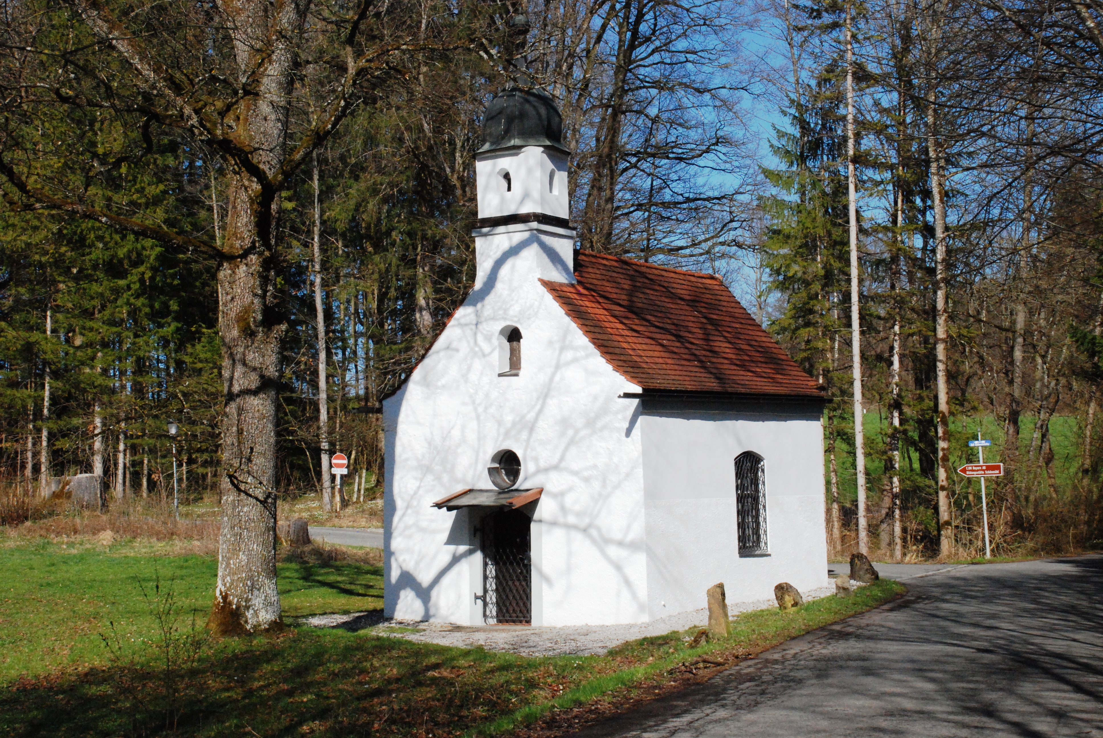 Kapelle in Schönmühl, Stadt Penzberg, Landkreis Weilheim-Schongau, Regierungsbezirk Oberbayern, Bayern. Als Baudenkmal unter Aktennummer D-1-90-141-21 in der Bayerischen Denkmalliste aufgeführt.